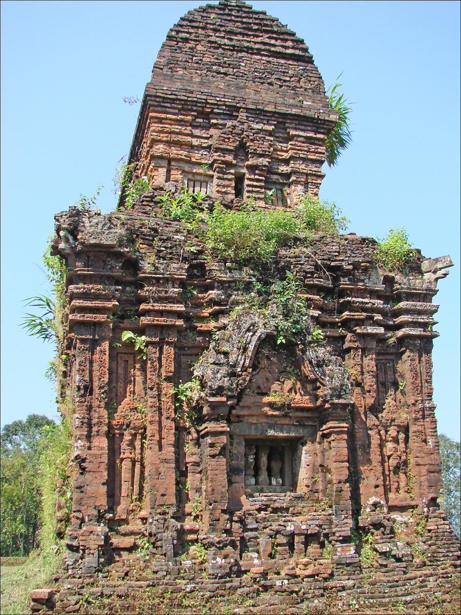 Le sanctuaire principal (kalan) -groupes B, C, D Edifice du groupe B Le temple Cham ou Kalan est probablement une représentation symbolique de Sikhara, le sommet de la montagne sacrée des Cham, appelé mont Meru dans le brahmanisme. Le mont Meru est la montagne mythique considérée comme l'axe du monde dans la mythologie hindoue.